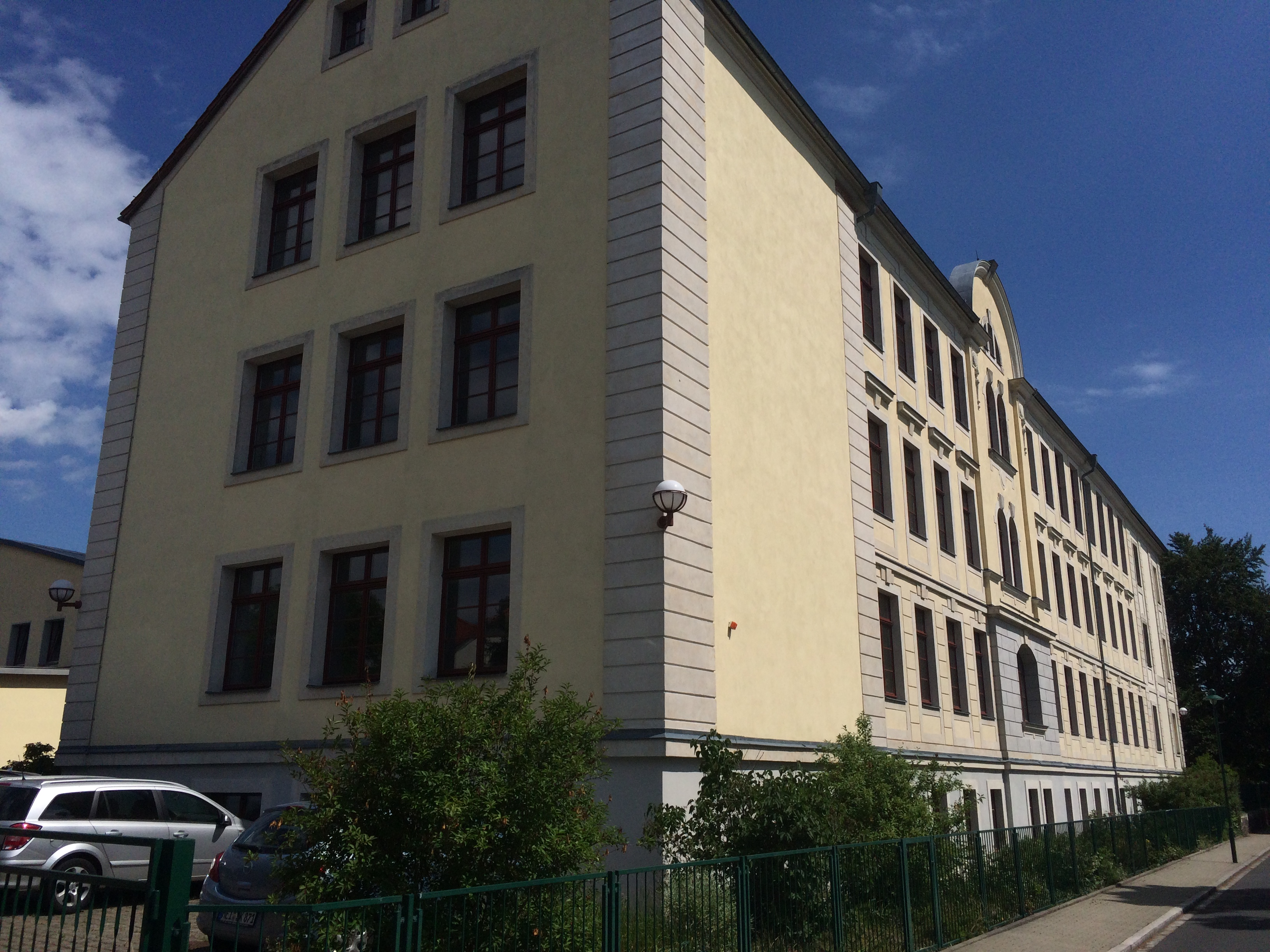 Bild der Schule (Ansicht des Westflügels)